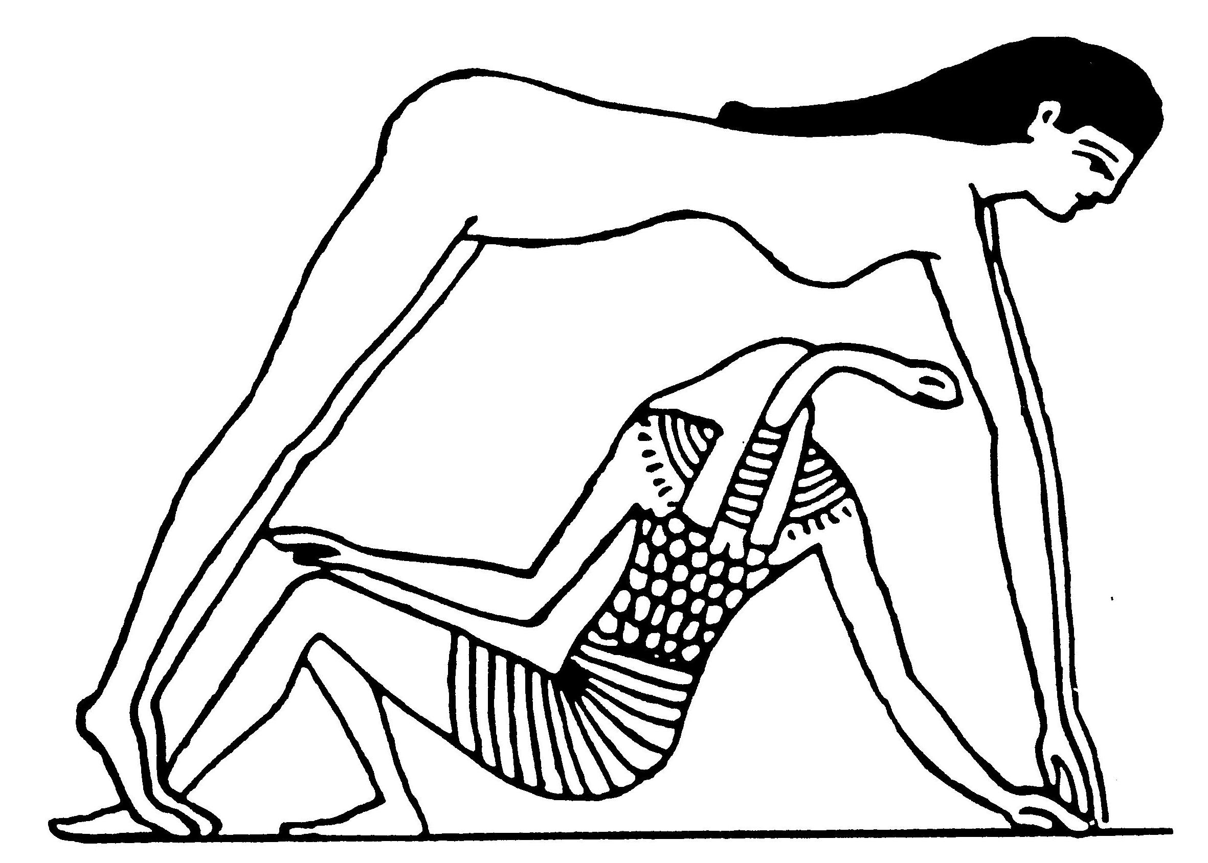 Geb_end_Nut01.jpg